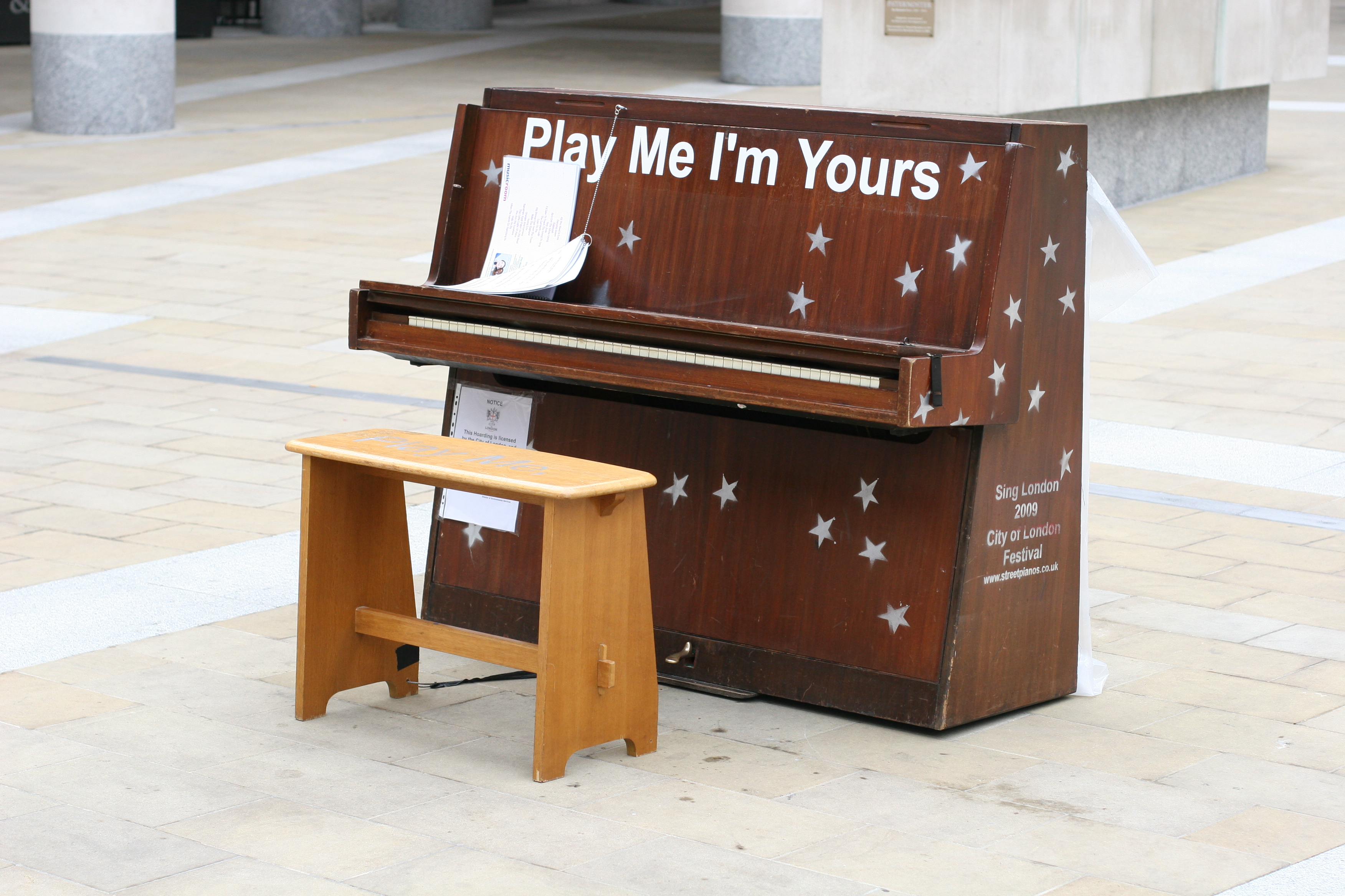 Public Piano